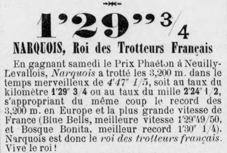 Article de presse annonçant le record européen de l'étalon Narquois